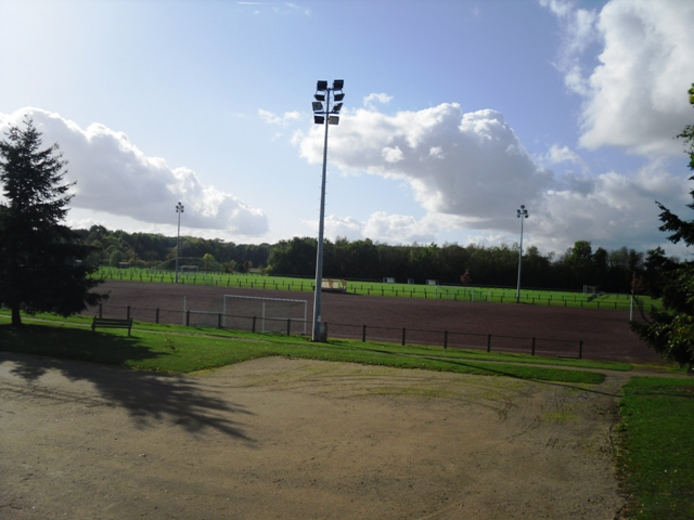 Le stade du Moulon à Gif-sur-Yvette (91)